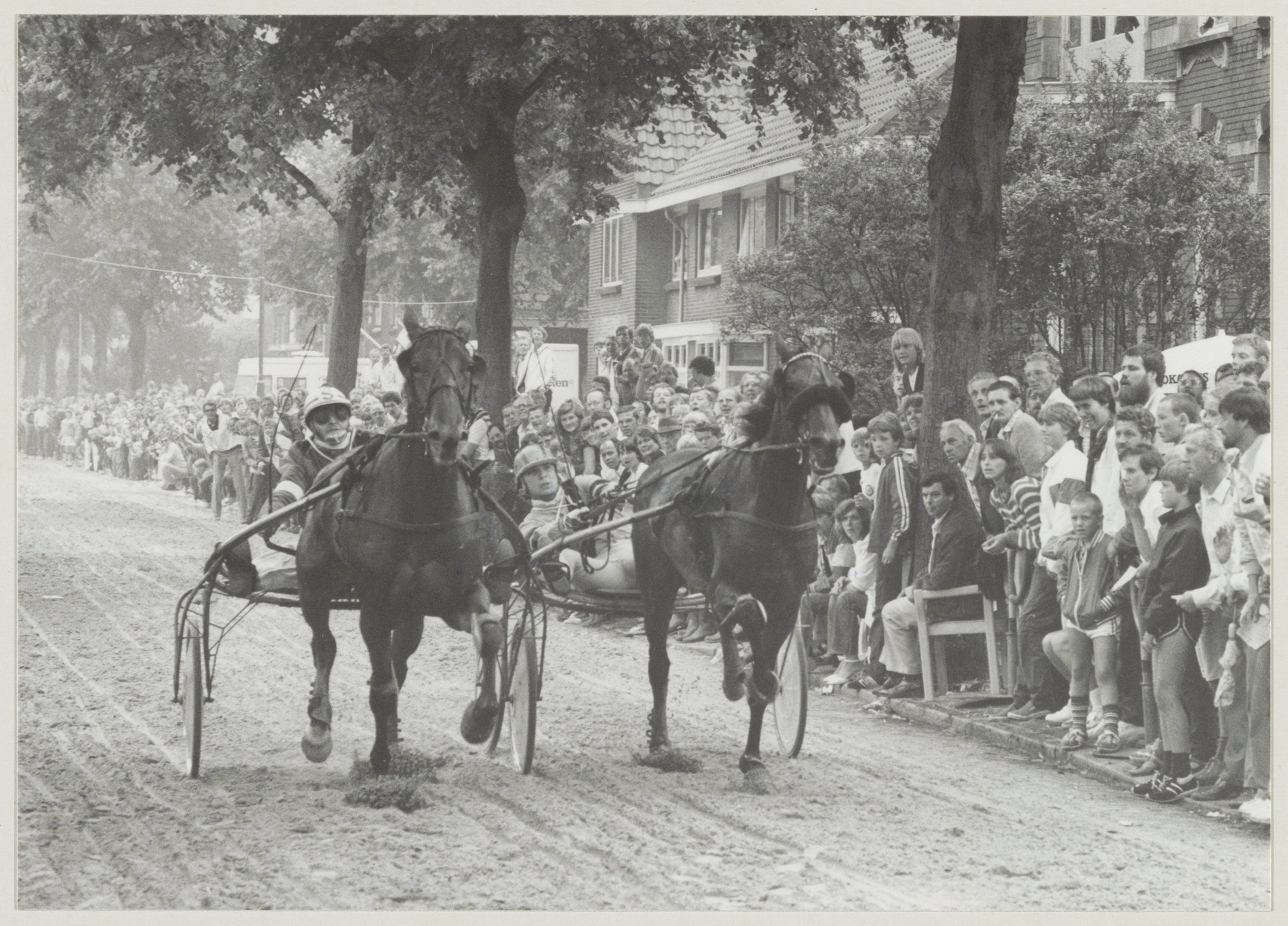 CollectieCollectie Fotoburo de BoerInventarisnummerNL-HlmNHA_54013082NL-HlmNHA_1478_22163KBeschrijvingKortebaandraverij in de Santpoortse Hoofdstraat in 1982.FotonummerNL-HlmNHA_1478_6547DocumenttypeTopografische prenten, tekeningen en foto'sVervaardigerBoer, Cees de (1918-1985) Soort vervaardigerFotograaf AnnotatiesHD.060882LandNederland ProvincieNoord-Holland GemeenteVelsen PlaatsSantpoort-Noord StraatHoofdstraat Begindatum08-1982Einddatum08-1982TechniekFoto TrefwoordenSport en recreatie, Straatgezichten